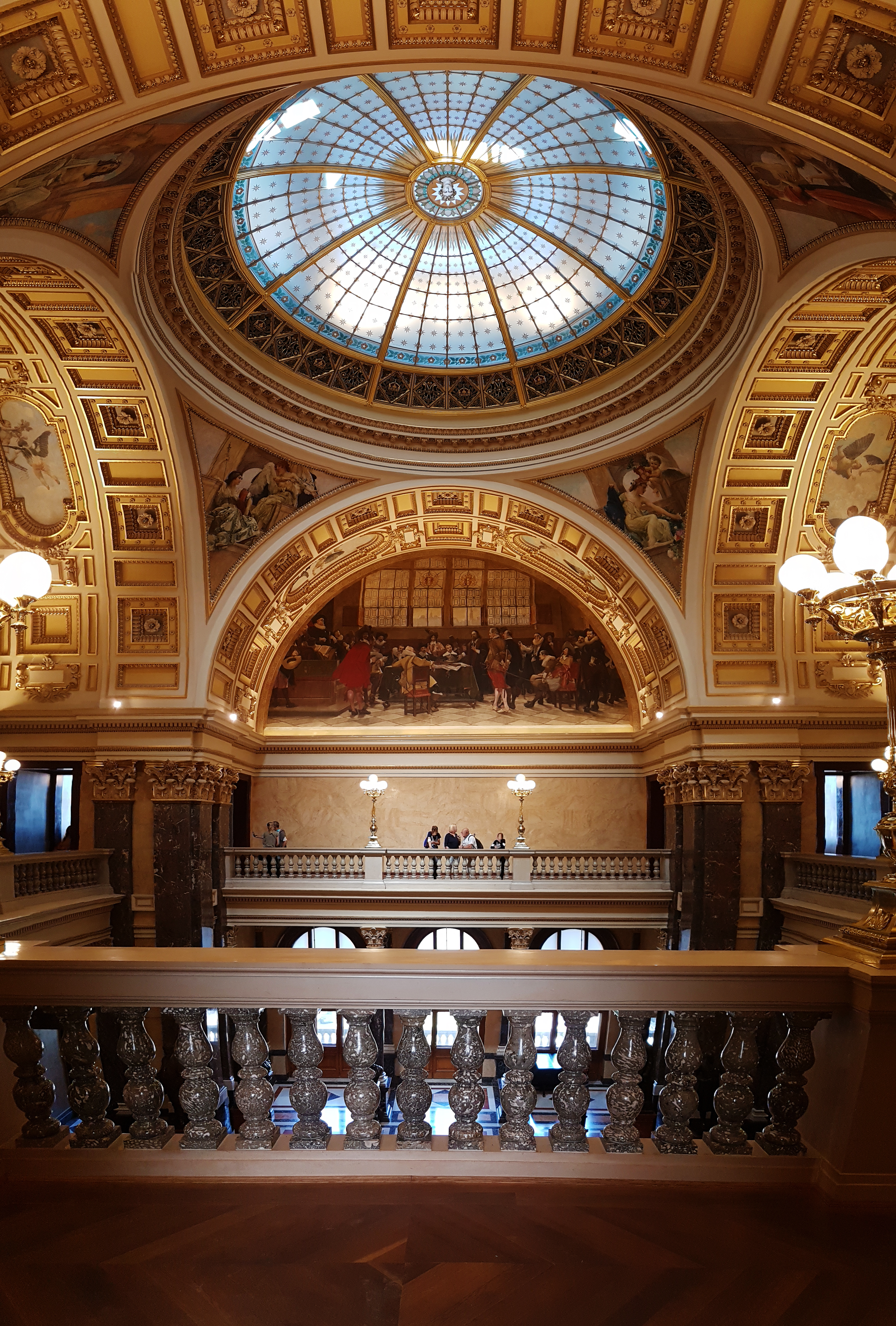 Praha Národní muzeum Prague National Museum Prag Nationalmuseum